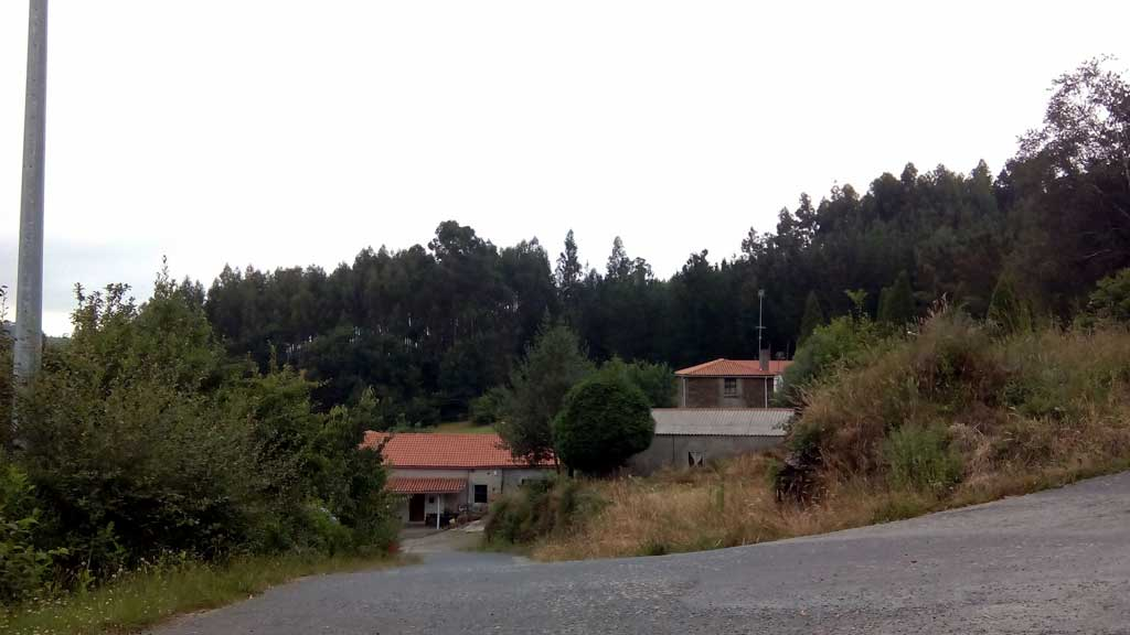 Vista de Cova, Oza dos Ríos.